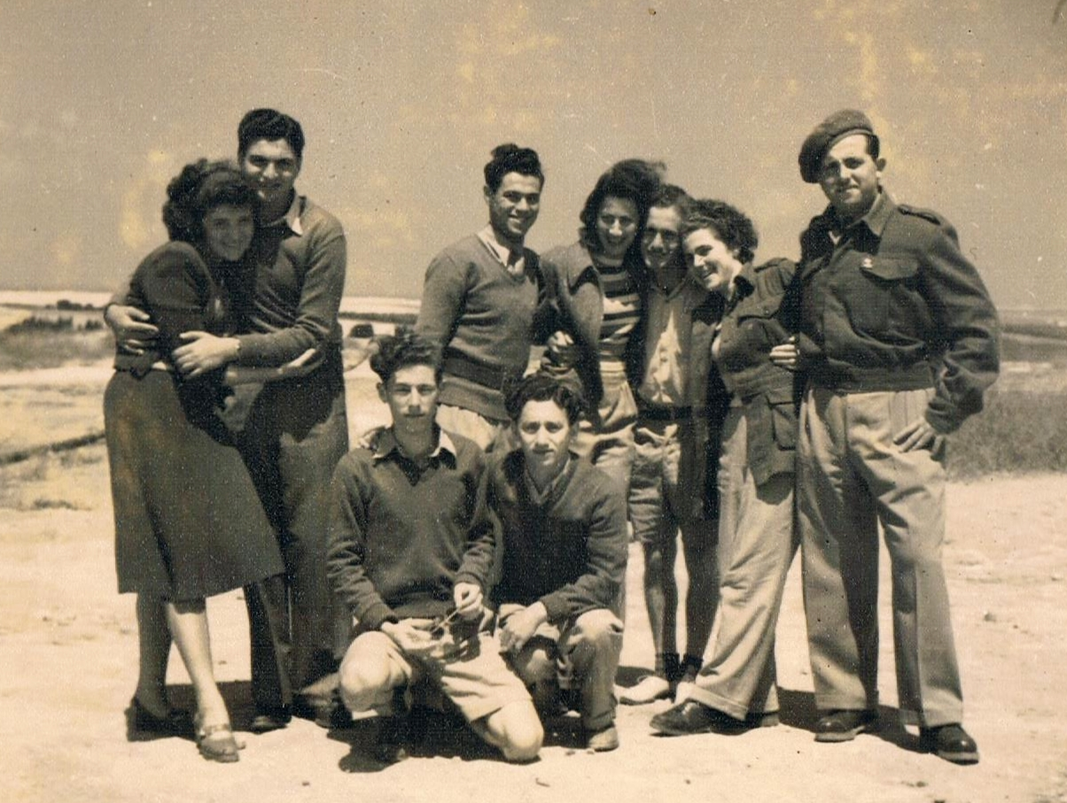 חברי הלהקה הצבאית הארצית